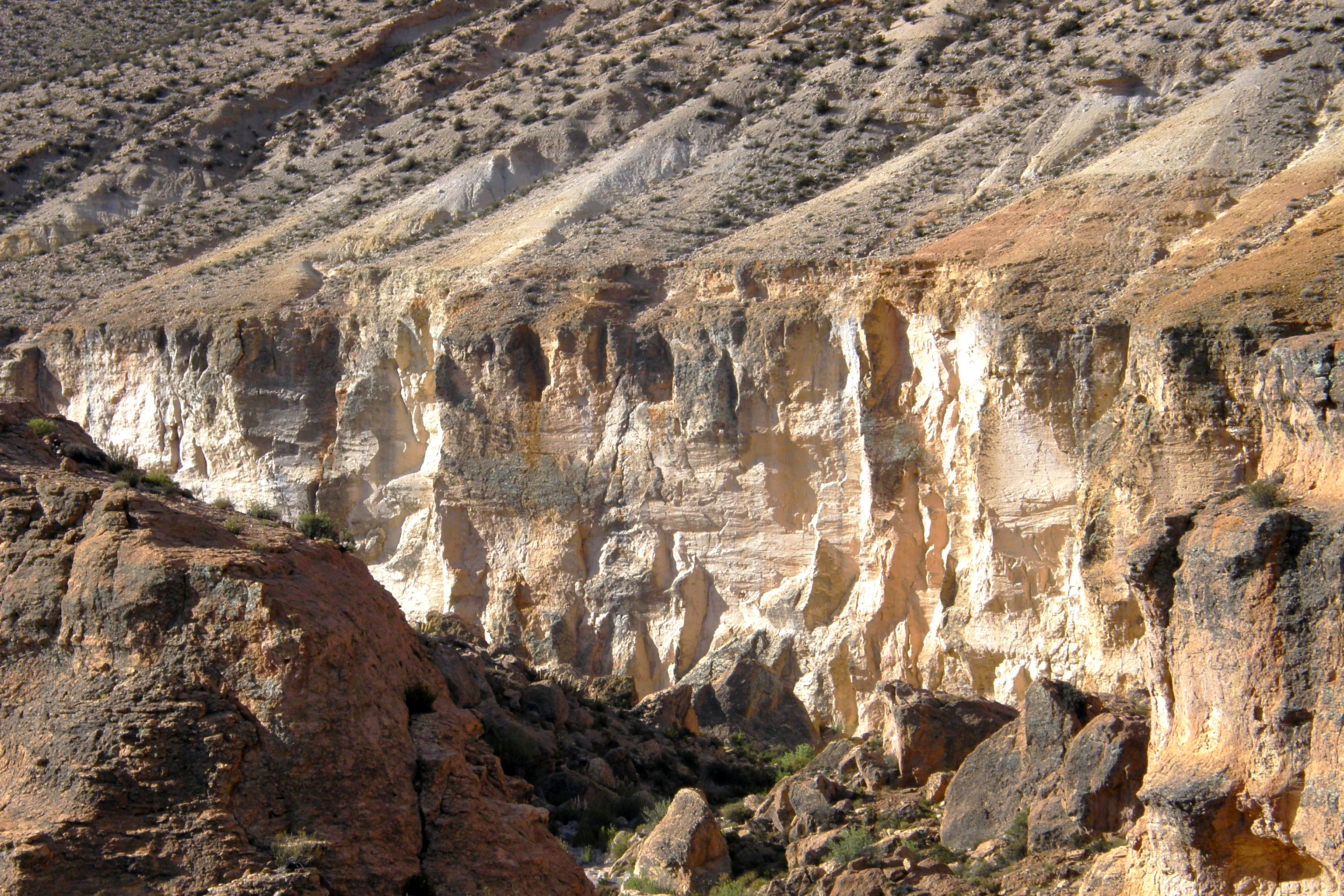 Rio Tignamar depuis la Rte A321, Commune de Putre, région XIII, Chili.